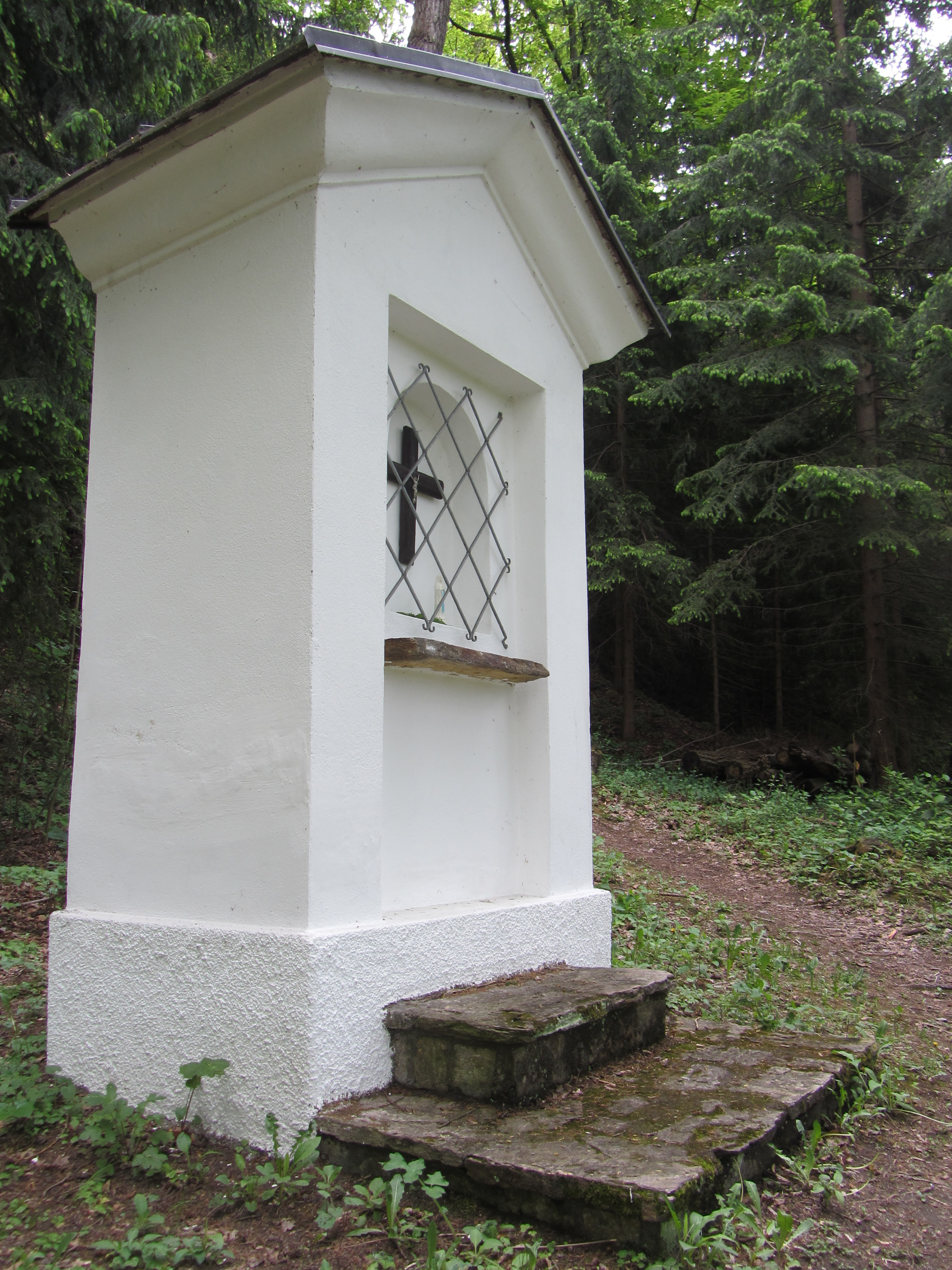 Kalvarienbergkapelle und Bildstöcke